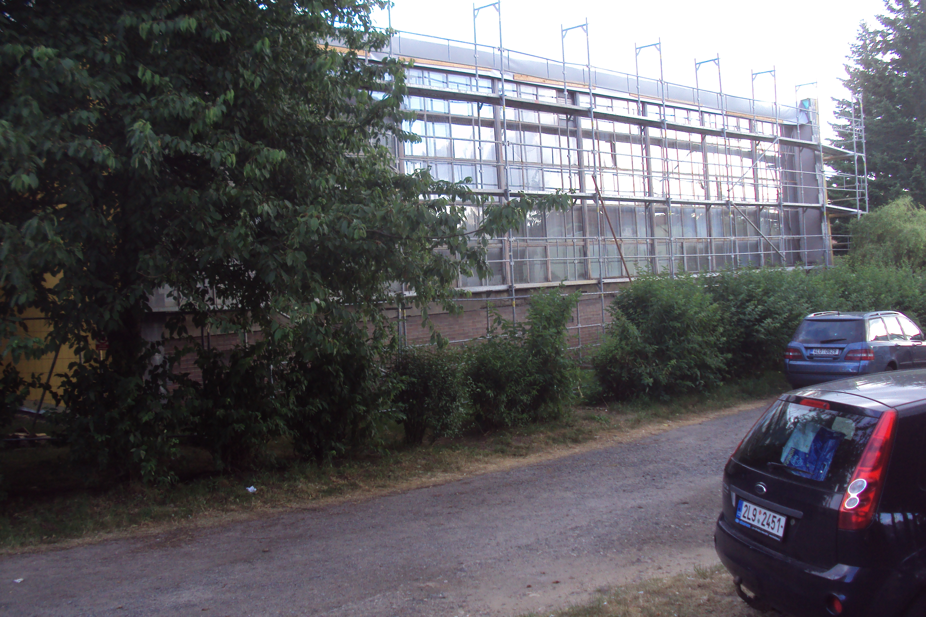 Tělocvična zákupské školy v lešení